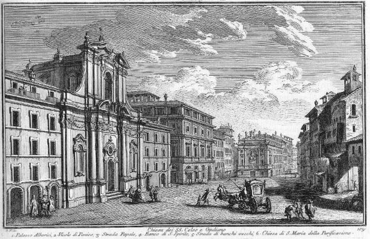 1) Palazzo Alberini; 2) Vicolo di Panico, a small street leading to Via dei Coronari; 3) Papal Street; 4) Banco di S. Spirito; 5) Strada di Banchi Vecchi; 6) S. Maria della Purificazione.